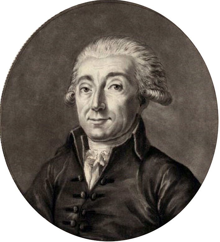 Portrait de Nicolas-Alexis-Guillaume Vadiers conseiller au présidial de Pamiers : deputé de la sénéchaussée du comté de Foix.